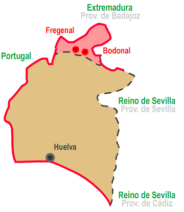 TERRITORIOS Fregenal - Pérdida Grazalema - Incroporación Nuevas Poblaciones de Andalucía y Sierra Morena Reino de Sevilla Reino anterior a 1833 Prov. de Málaga Provincia nueva de 1833